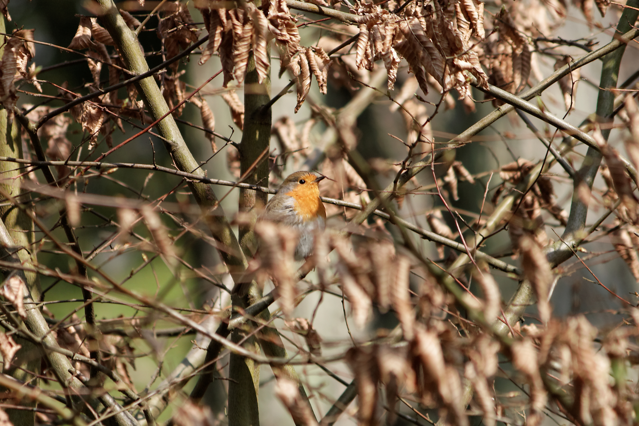 Rouge-gorge dans le jardin Victor-Garnier, à Provins (France)